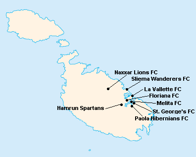 Répartition des clubs en First Division Maltaise 1946-1947.